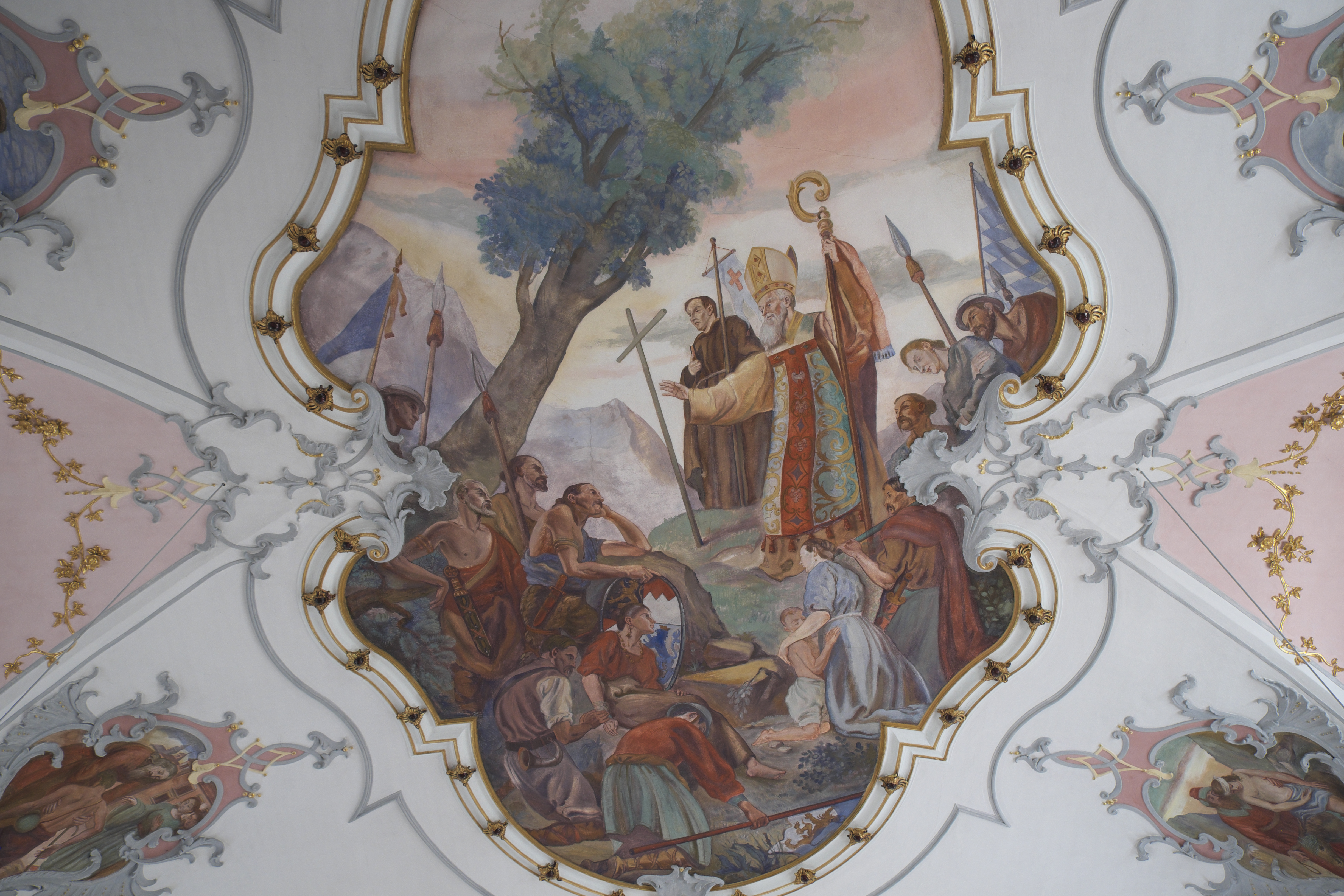 Katholische Pfarrkirche St. Rupert in Oberdießen (Unterdießen) im Landkreis Landsberg am Lech (Bayern/Deutschland), Deckenmalerei